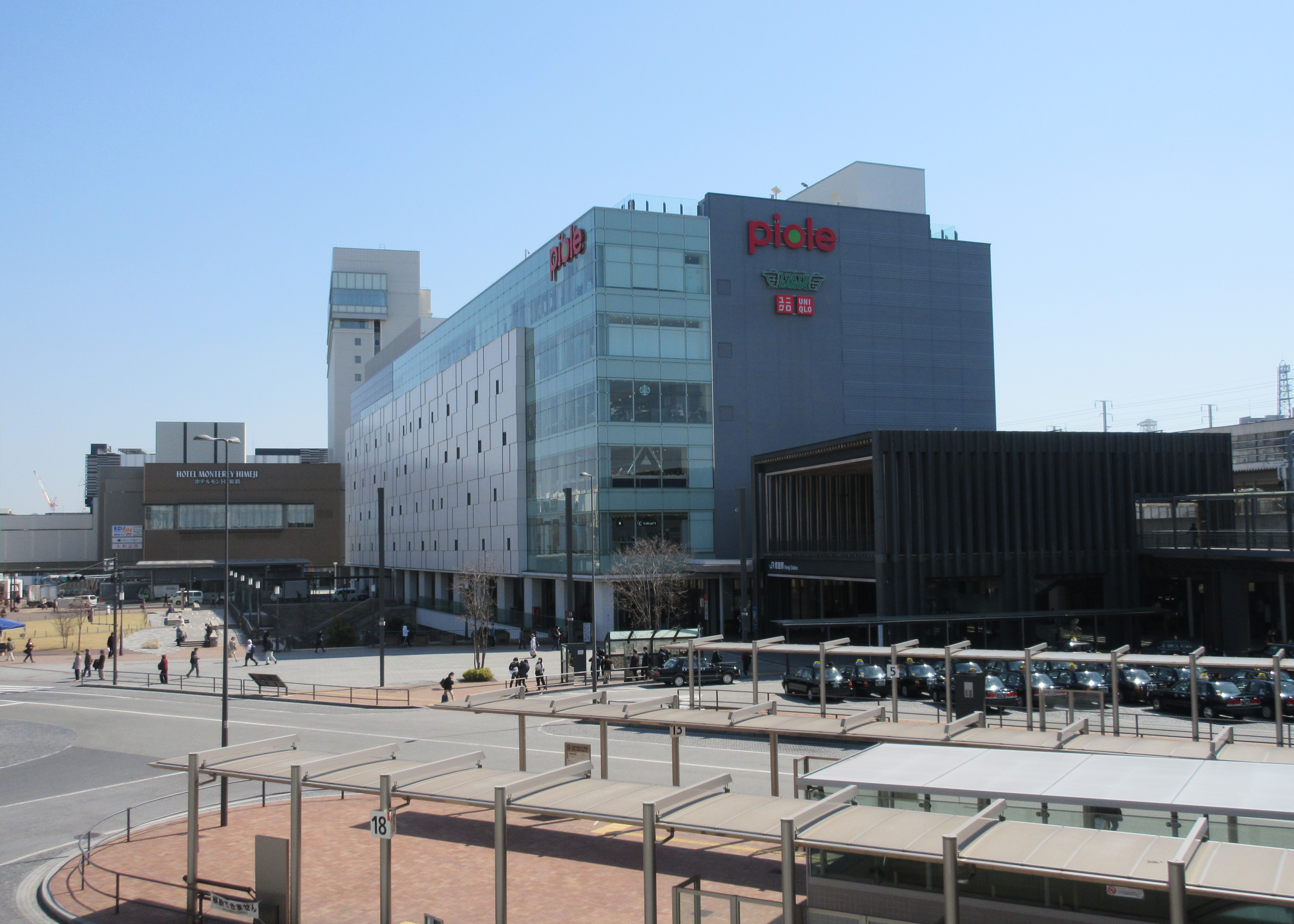 JR姫路駅